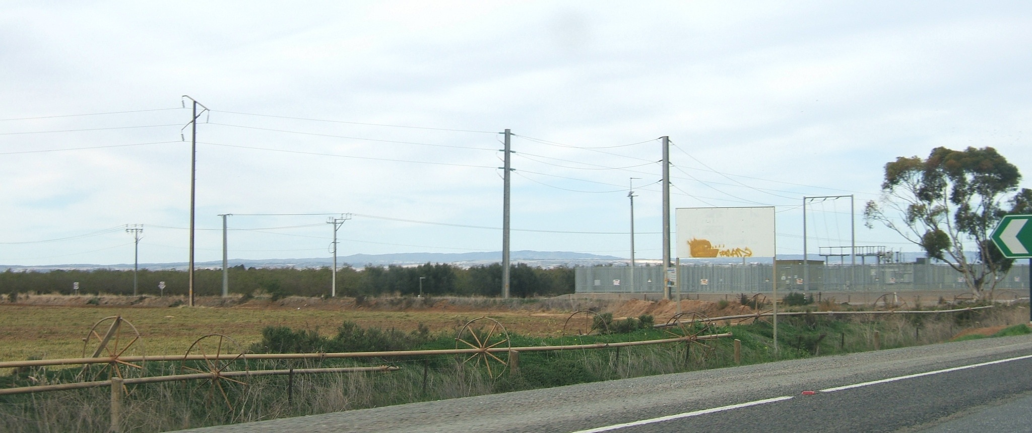 Virginia, Adelaide